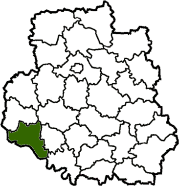 MogilivPodilskyi-Raion map